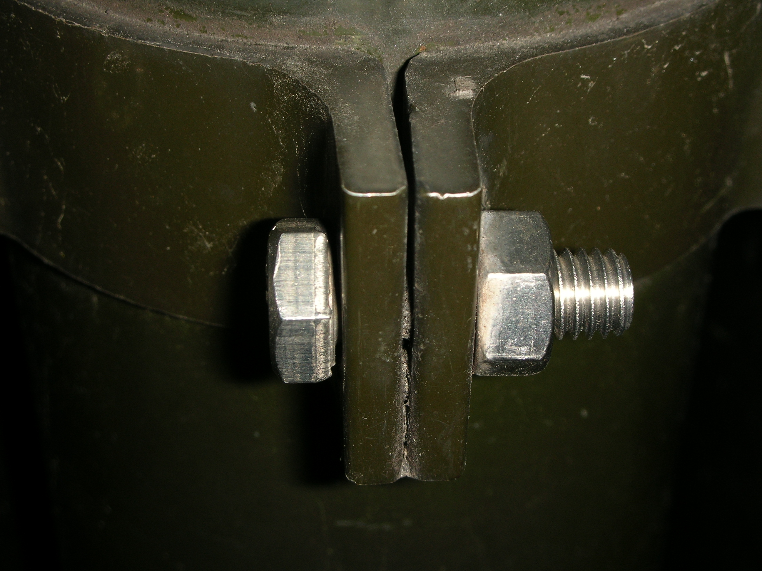 Schraubverbindung, korrosionsgeschützt, an einem Fahrplanschild im Freien